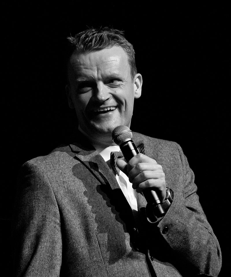 Frank Hvam på Bremen Teater 12. januar 2013